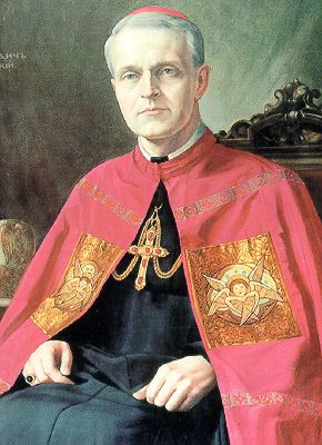 Sel. Pavol - Peter - Godjic, 1888-1960, Griechisch-katholischer Bischof der Eparchie Presov (1926-1960)